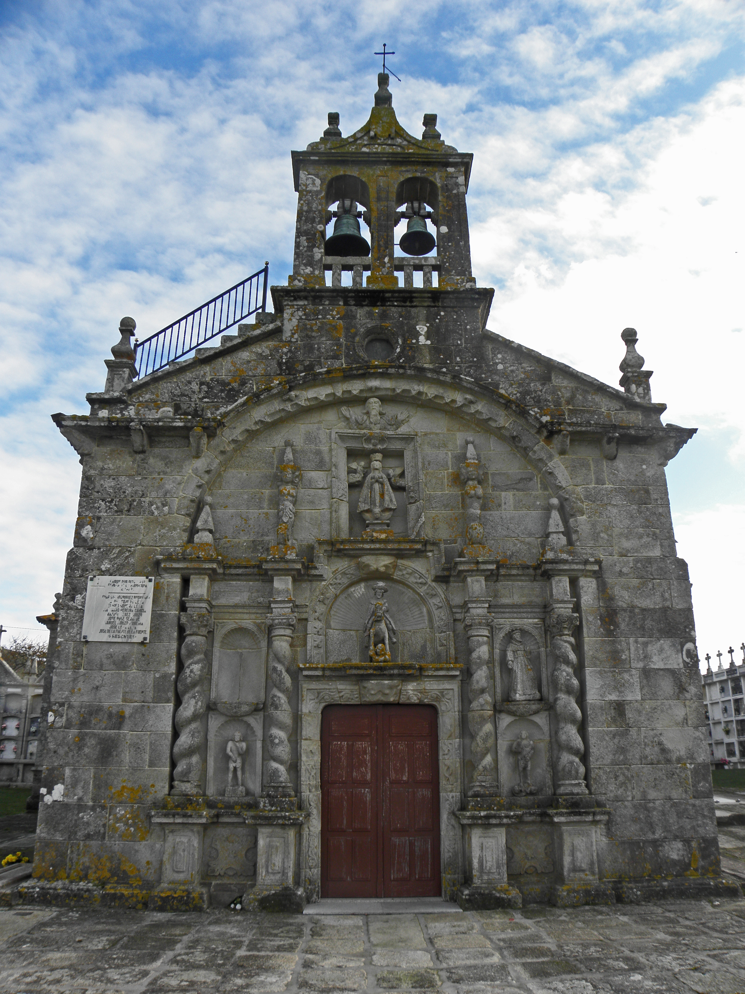 Igrexa de Santiago de Traba, Laxe.